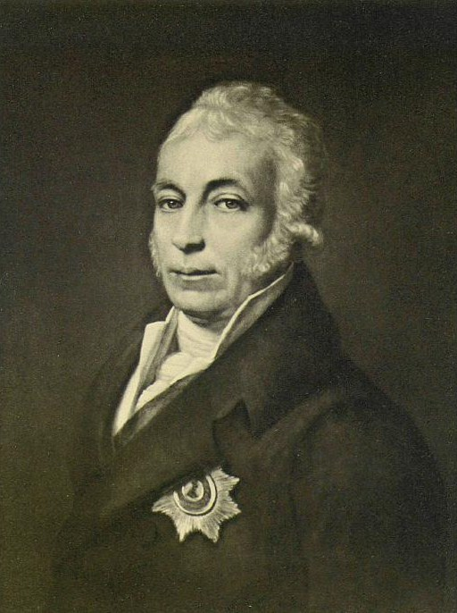 Портрет Н.А.Загряжского (1742-1821)